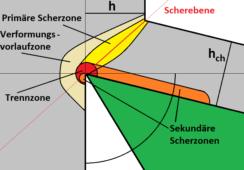 Spandildungsprozess mit mehreren Scherzonen.